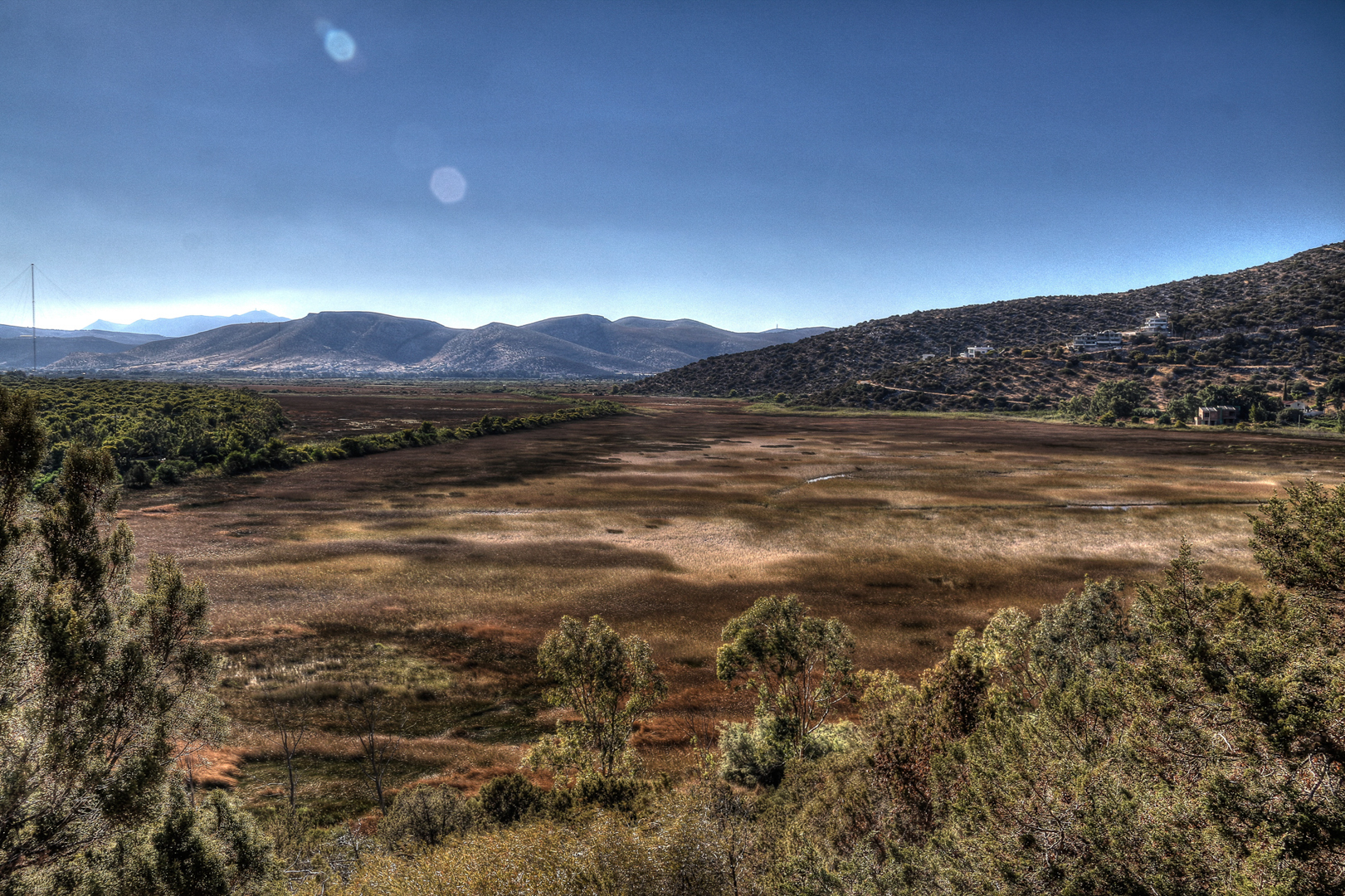 Εθνικό Πάρχο Σχινιά This is a photography of Natura 2000 protected area with ID GR3000003